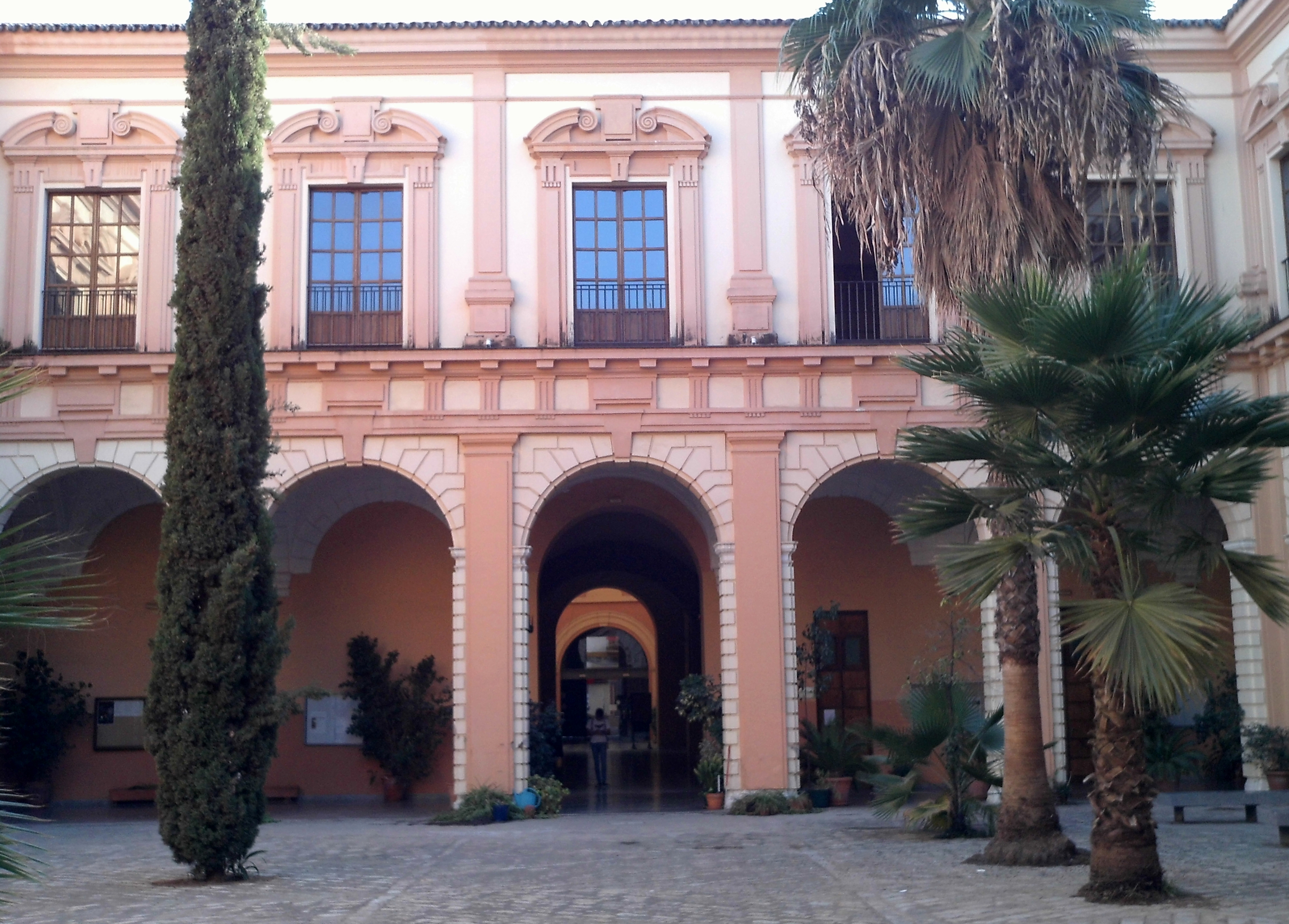 Conservatorio Superior de Música Manuel Castillo. Sevilla, Andalucía, España.